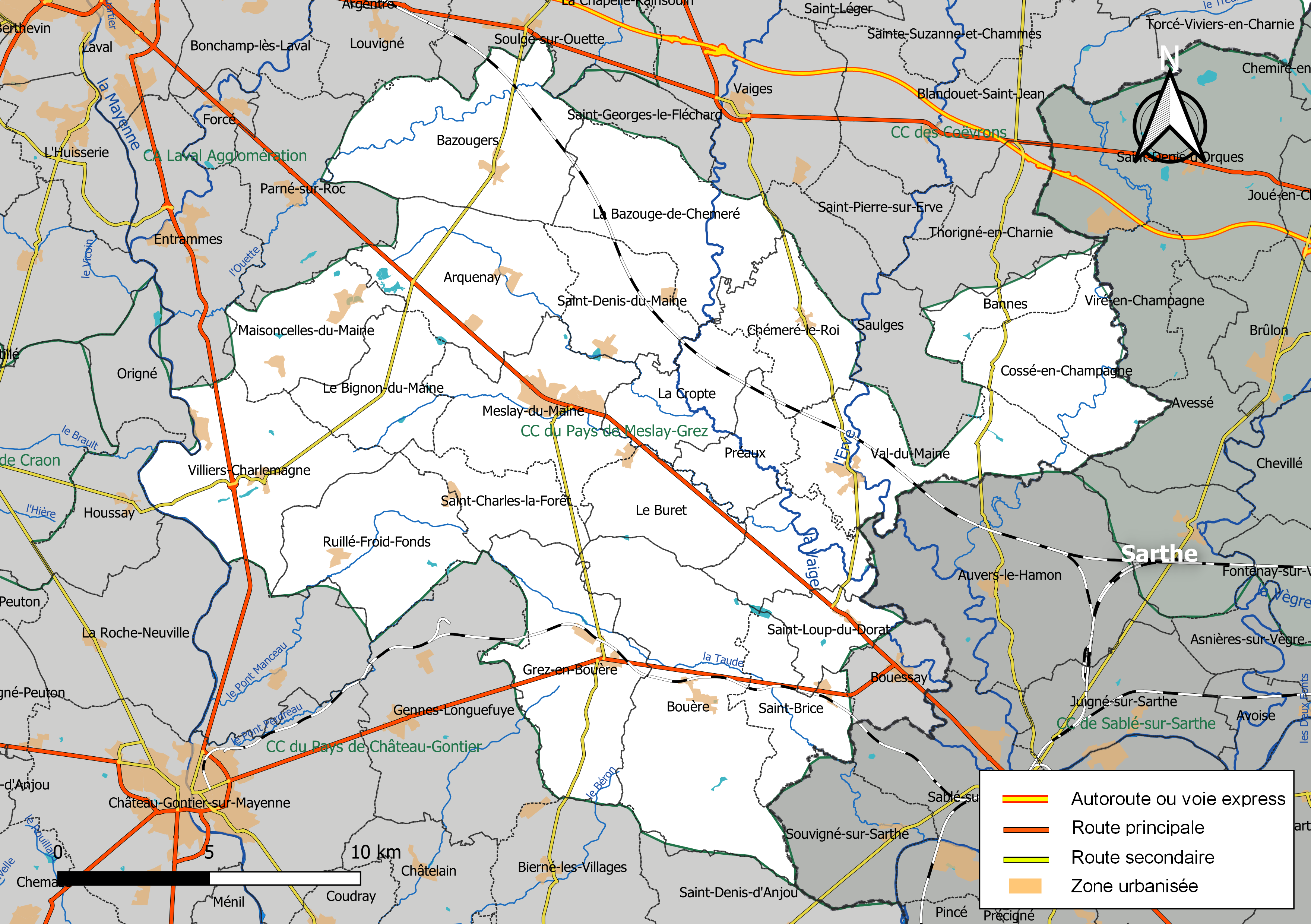 Carte géographique de la Communauté de communes du Pays de Meslay-Grez, département de la Mayenne, France. Composition au 1er janvier 2019.